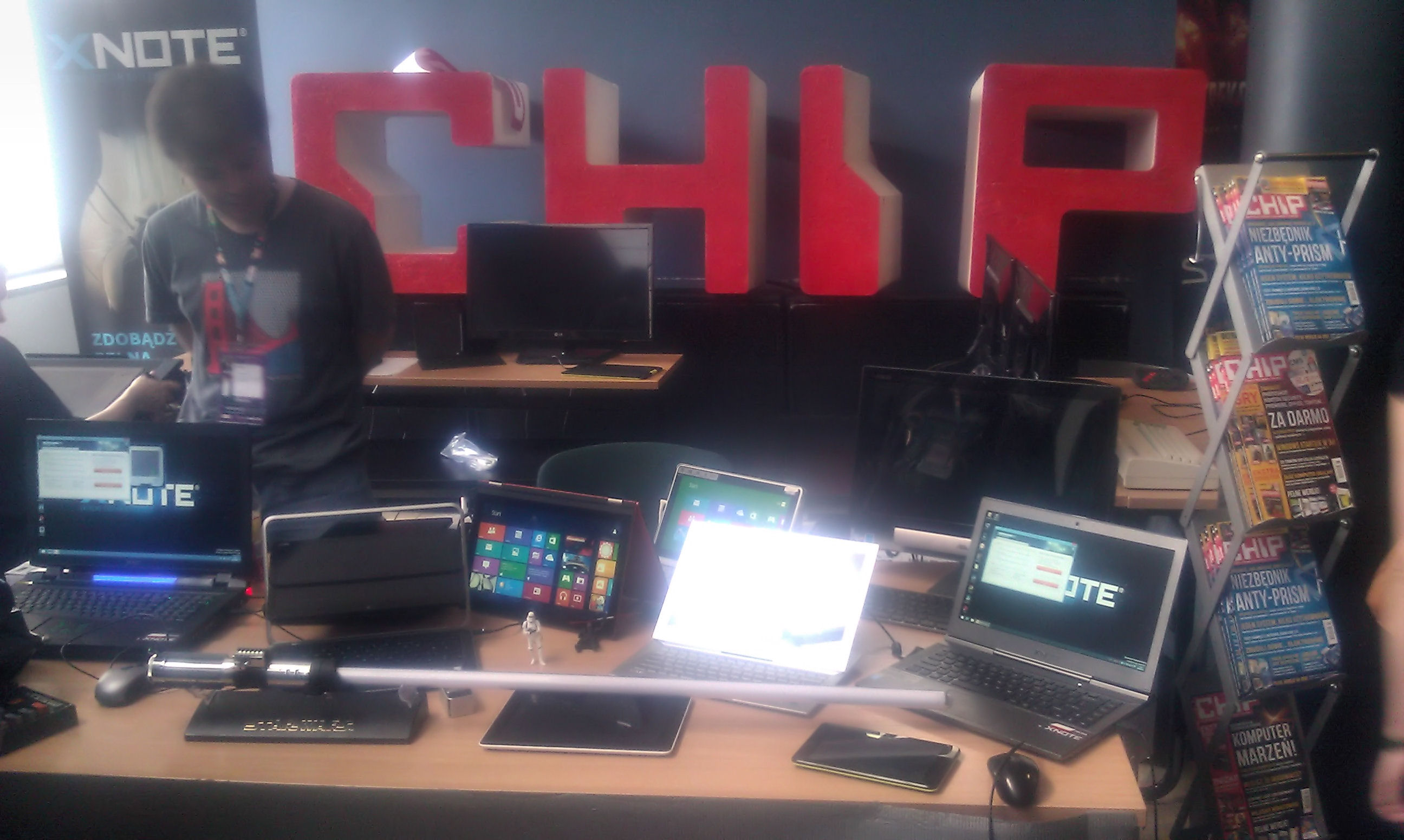 Stoisko wydawnictwa CHIP, Polcon 2013 w Warszawie